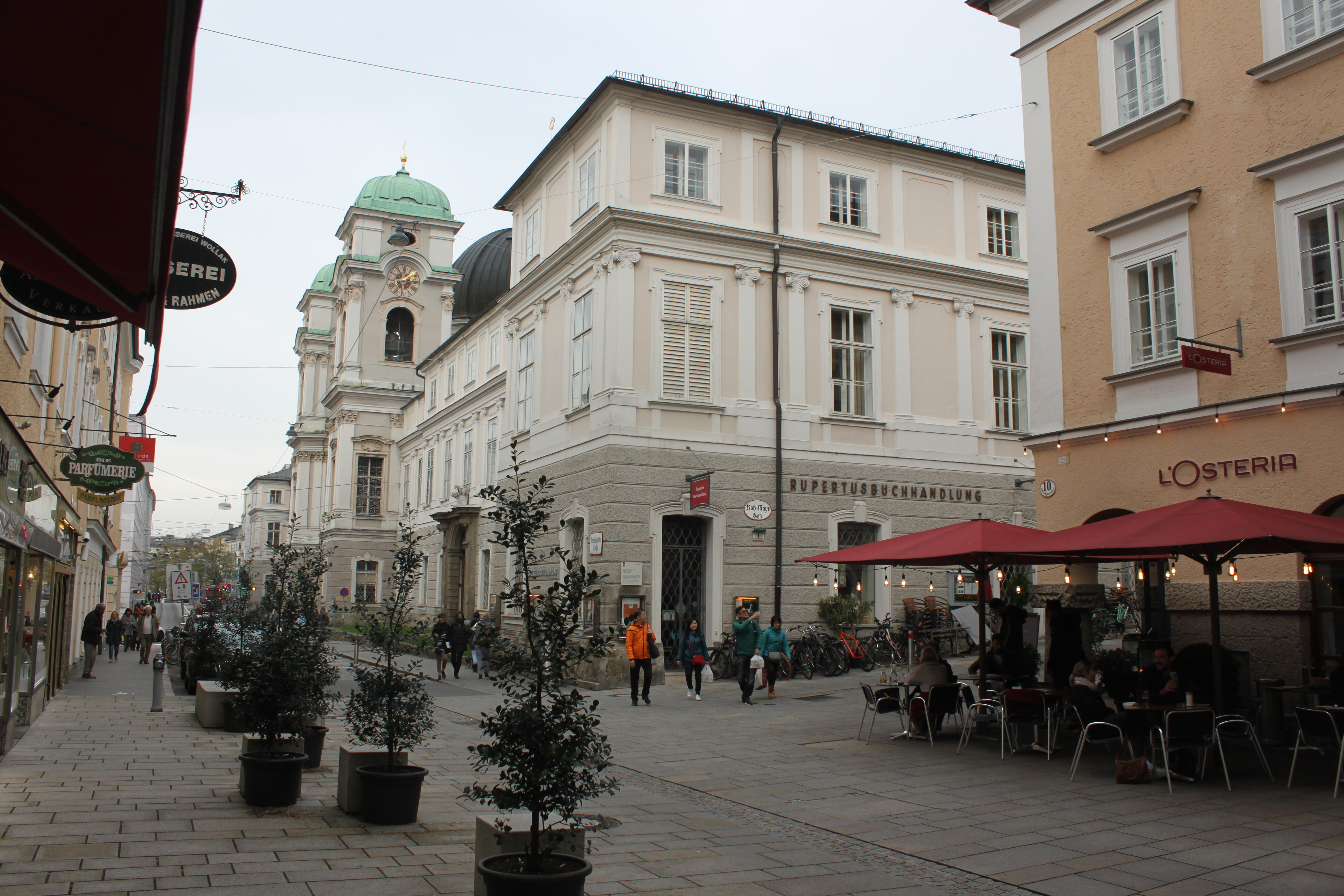 Dreifaltigkeitskirche und Priesterhaus, Dreifaltigkeitsgasse mit Hauptfront, Ecke Richard-Mayr-Gasse, Rupertusbuchhandlung